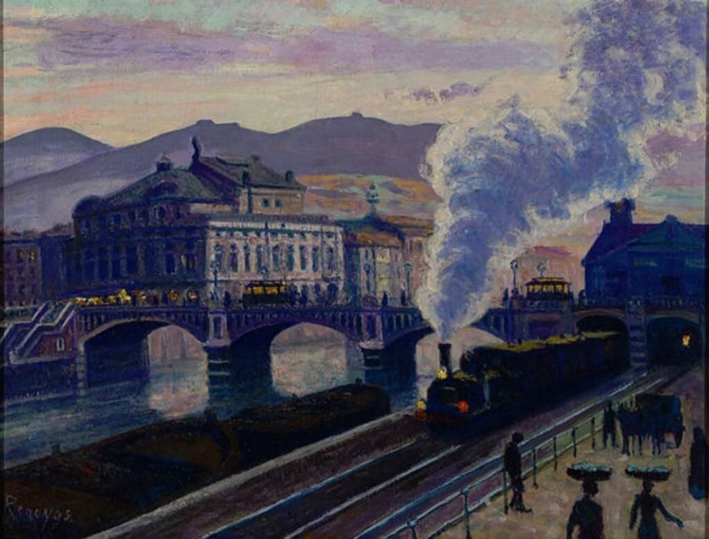 Dario de Regoyosen Bilboko Areatza zubiaren margolana